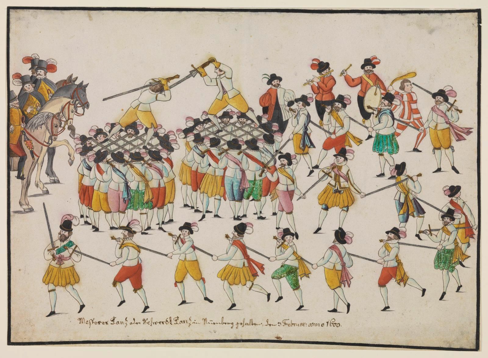 Schwerttanz und Fechtspiel der Nürnberger Messerschmiede, Nürnberg, 1600, Nürnberg, Germanisches Nationalmuseum, Graphische Sammlung, Inv.-Nr. HB 3361; Maße: 37 x 51 cm (Blatt)